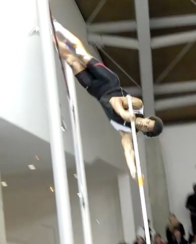 Damiel Dossevi lors d'un saut à 5,56 m au Perche Concept Mixte à Paris.